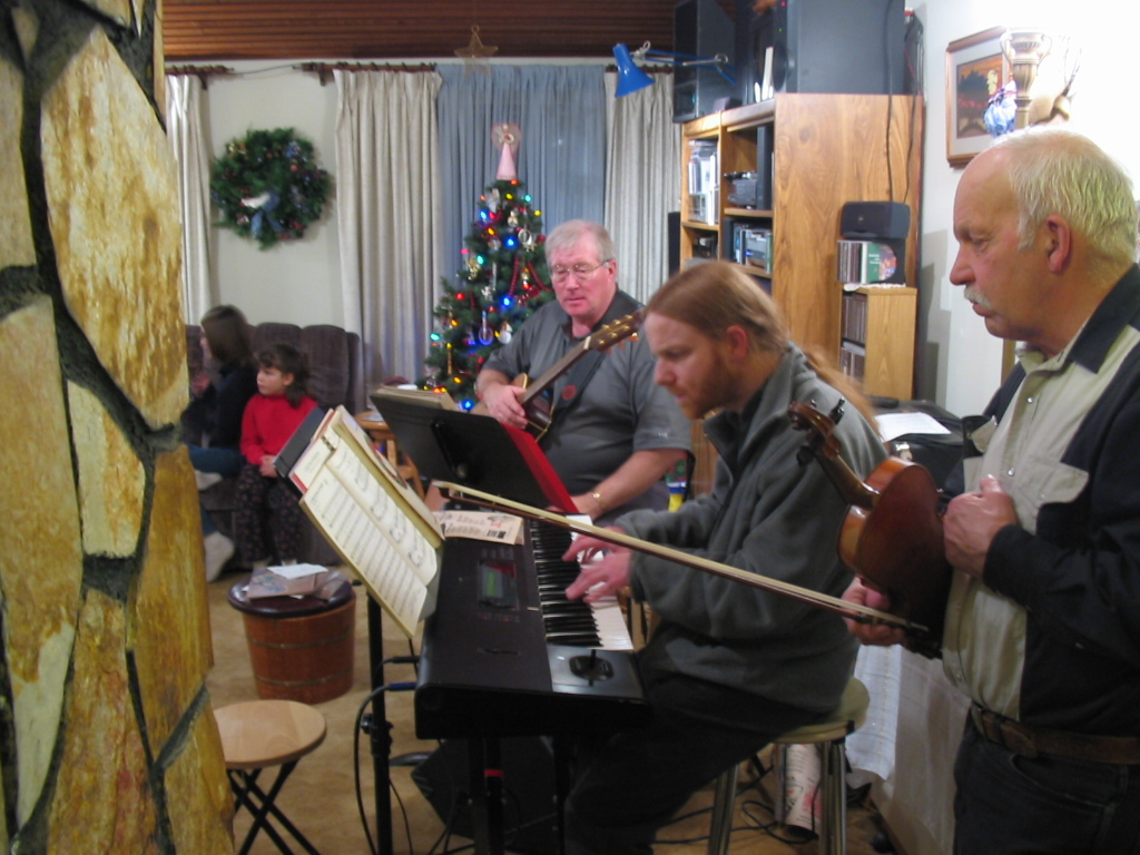 Sing along